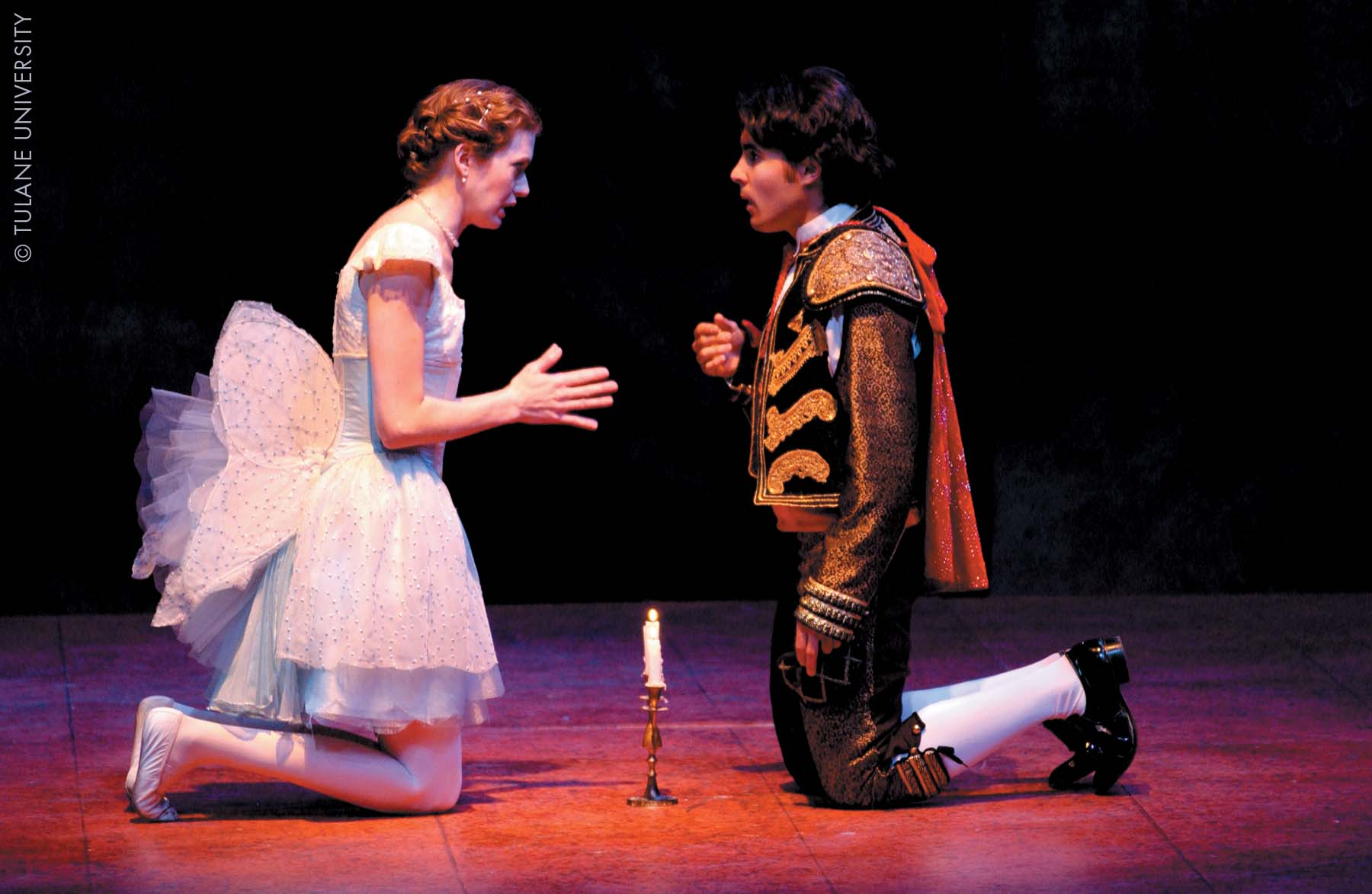 Romeo & Juliet